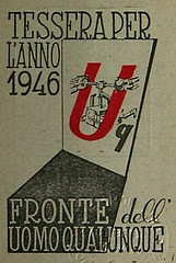 Carte Adhérant au Fronte dell'uomo Qualunque année 1946